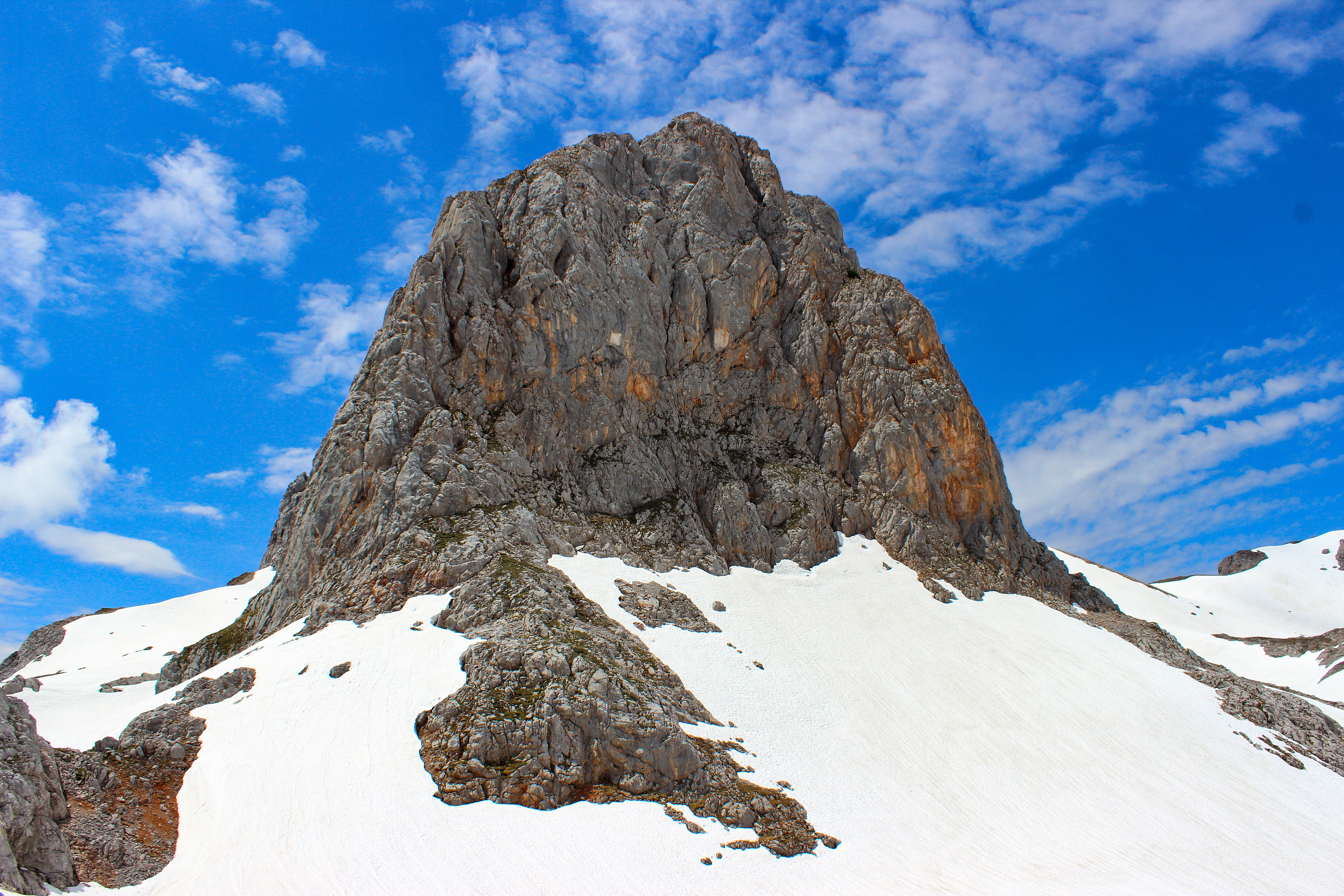 Hundstodgatterl Berchtesgadener Alpen